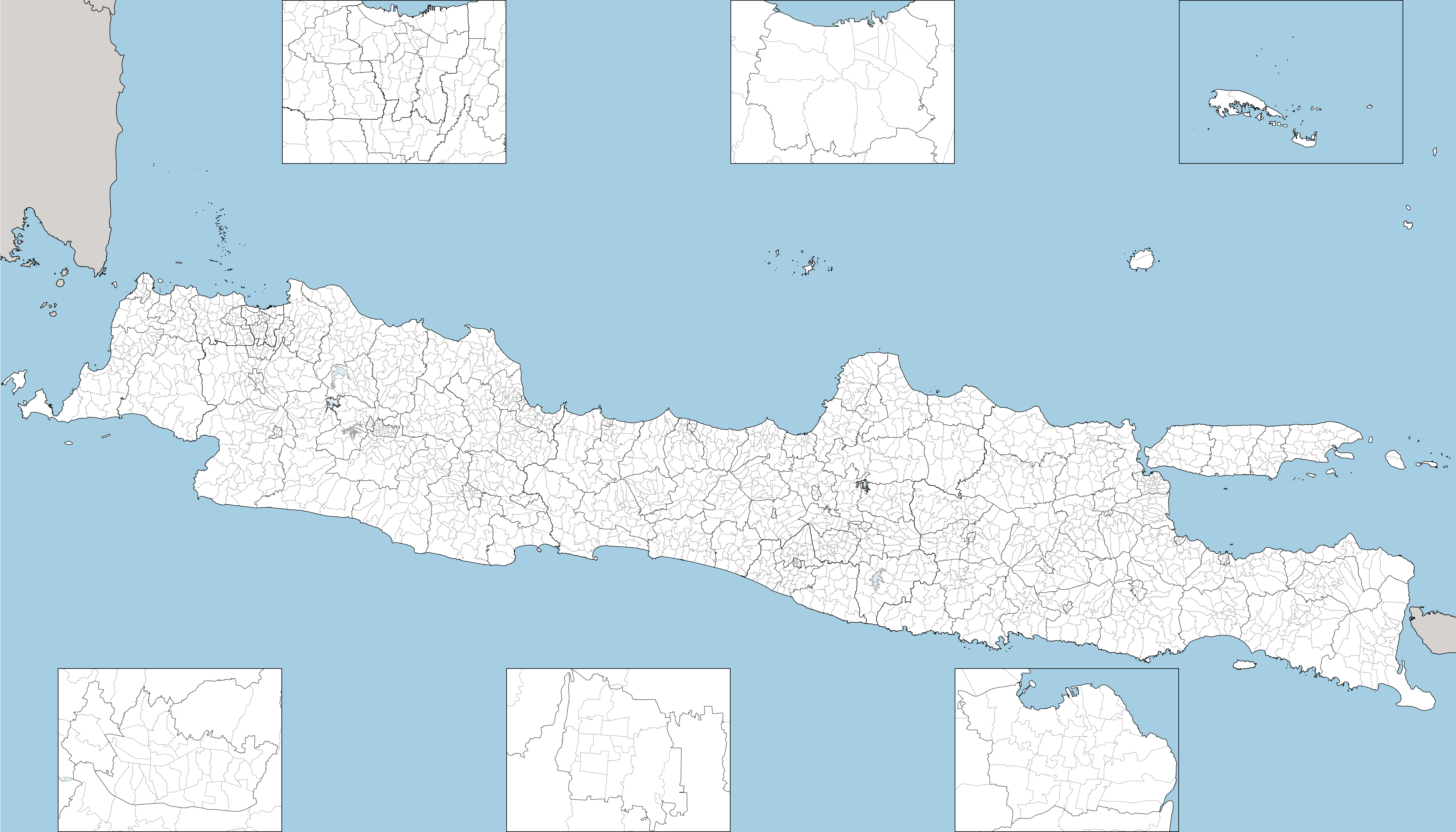 Peta yang menyajikan batas-batas administrasi tingkat Provinsi, Kabupaten/Kota dan Kecamatan yang ada di Pulau Jawa